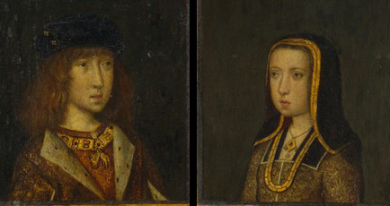 König Philipp I. der Schöne als Sechzehnjähriger und seine Schwester Margarete (1480 - 1530) im 14. Lebensjahr, Diptychon